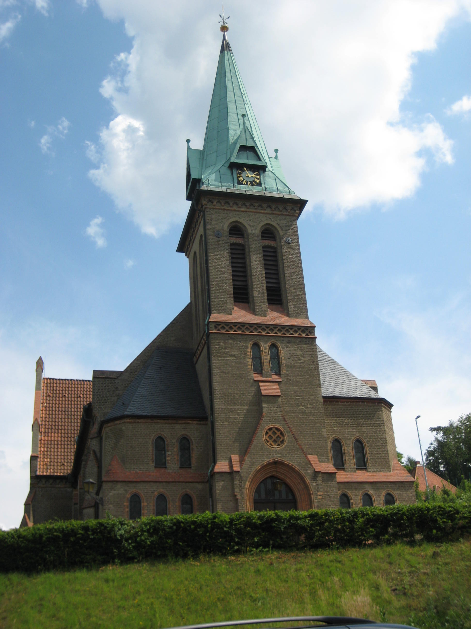 Lutherkirche